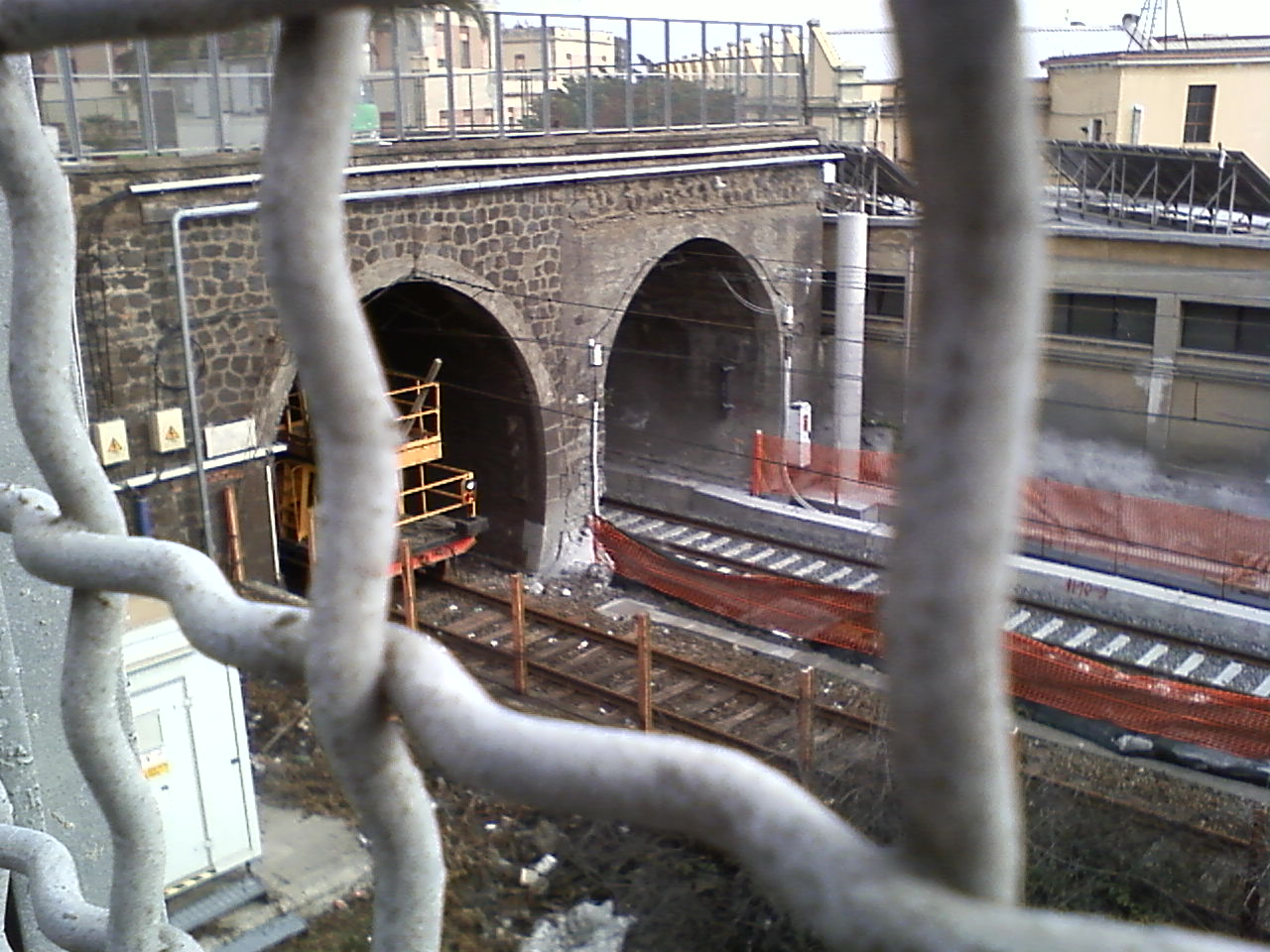 Nuova galleria attivata del passante ferroviario di Catania.